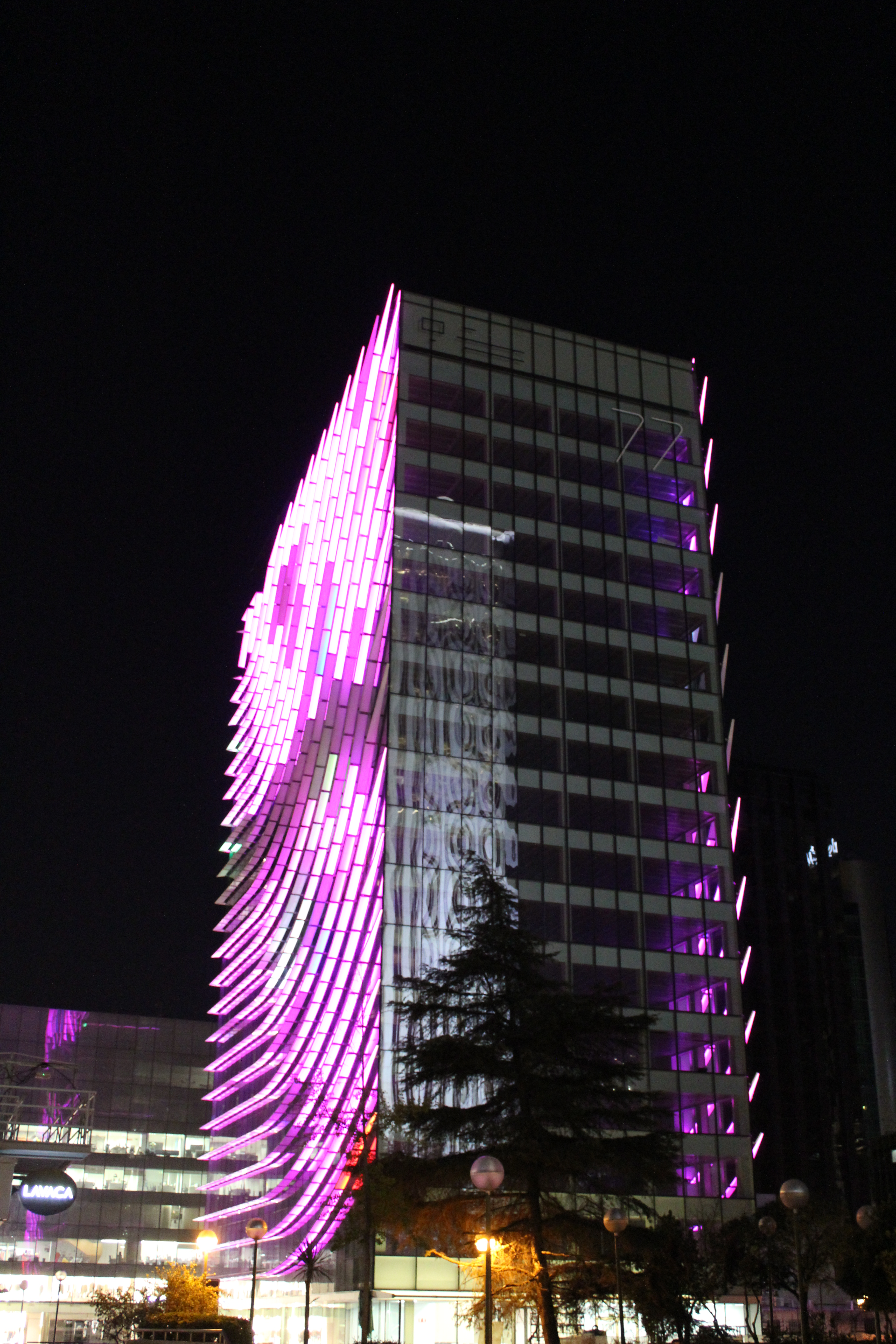 Edificio Castellana 77 (violeta), Madrid.